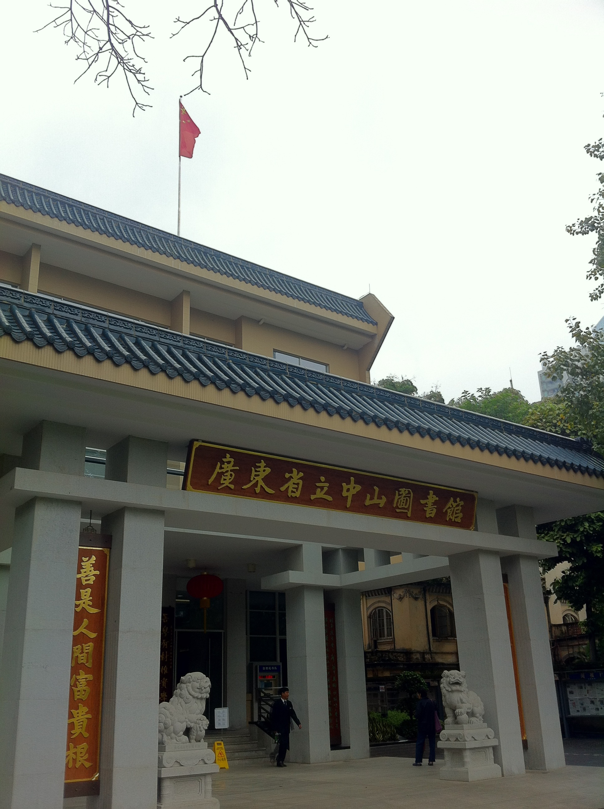 zslid_正门